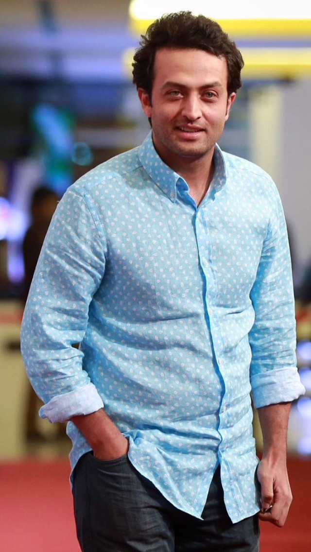 مصطفى زماىى در جشن سريال شهرزاد